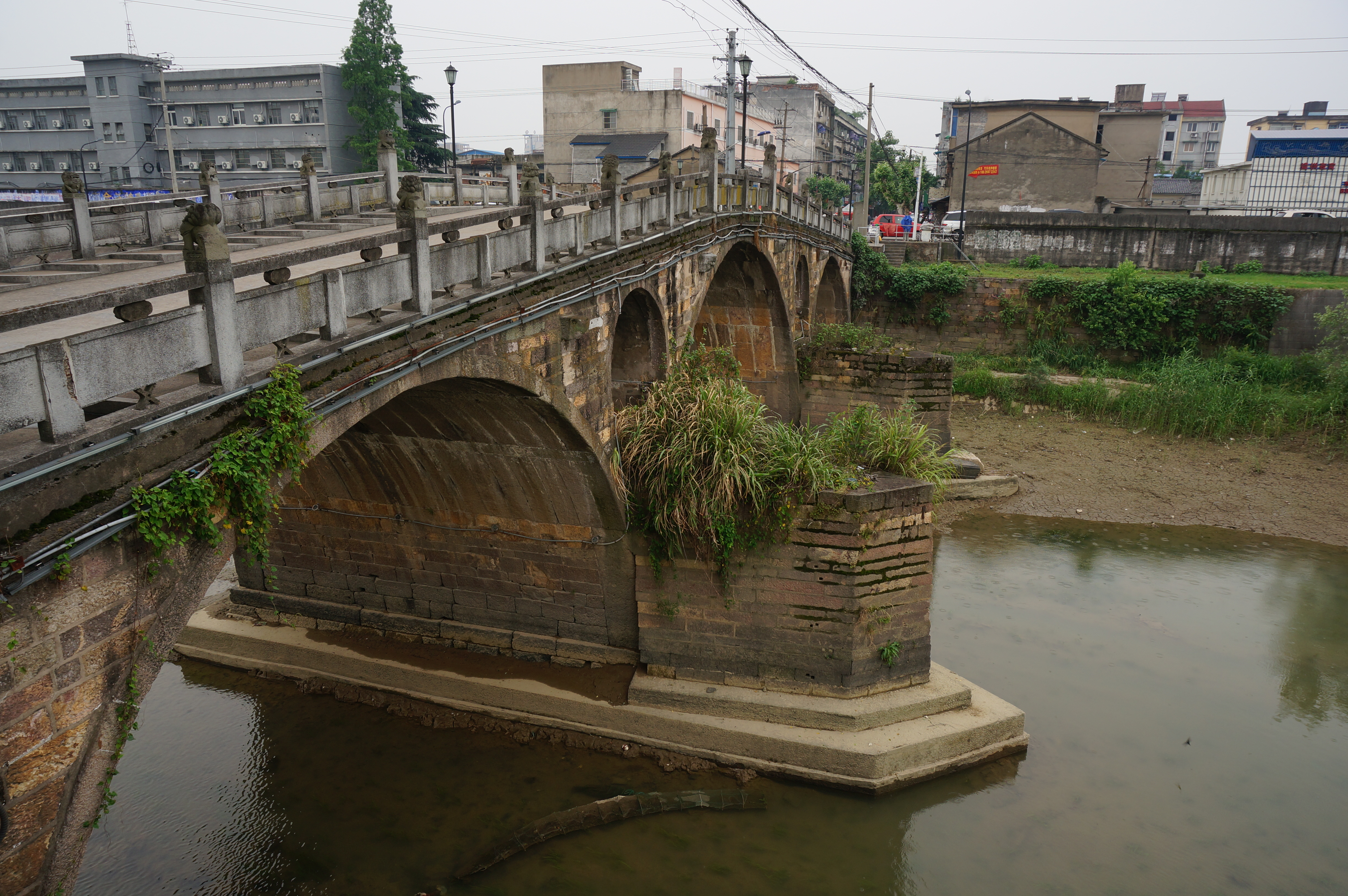 余杭通济桥，西侧，自旧桥和新桥之间的连接墩上看。